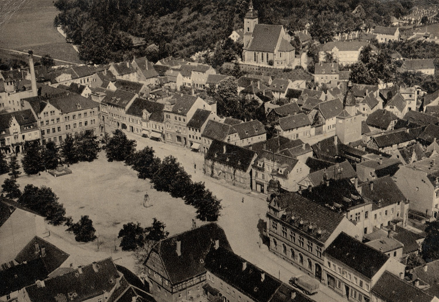 Groitzsch in Sachsen, Marktpartie, Fliegeraufnahme 1938